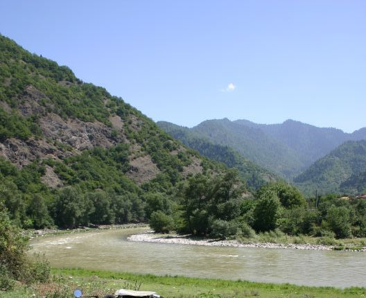 Kura river near Akhaltsikhe